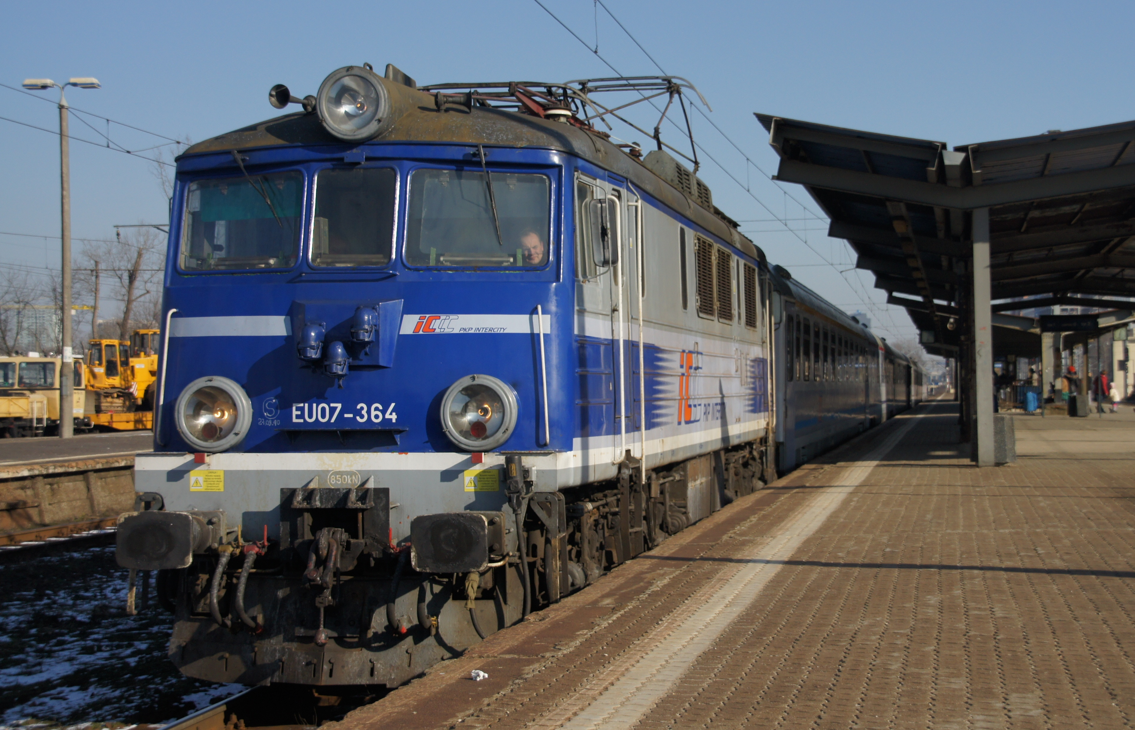 Lokomotywa elektryczna typu EU07, o numerze 364, w malowaniu PKP Intercity, na PKP Warszawa Zachodnia